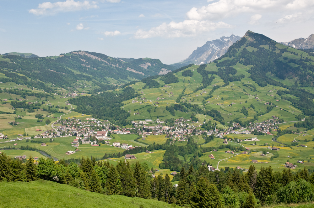 Neu St. Johann (left) and Nesslau (right) / behind Ennetbühl